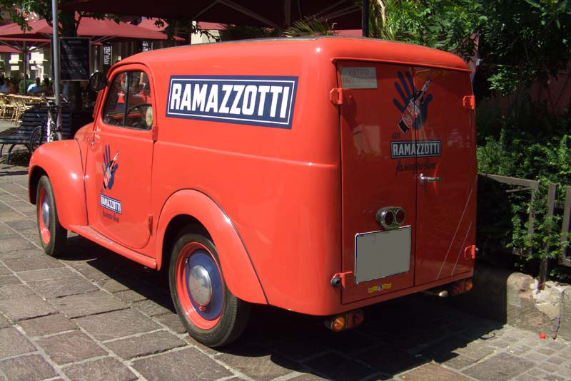 La mitica TOPOLINO, formato furgoncino (FIAT) con la pubblicità della Ramazzotti.